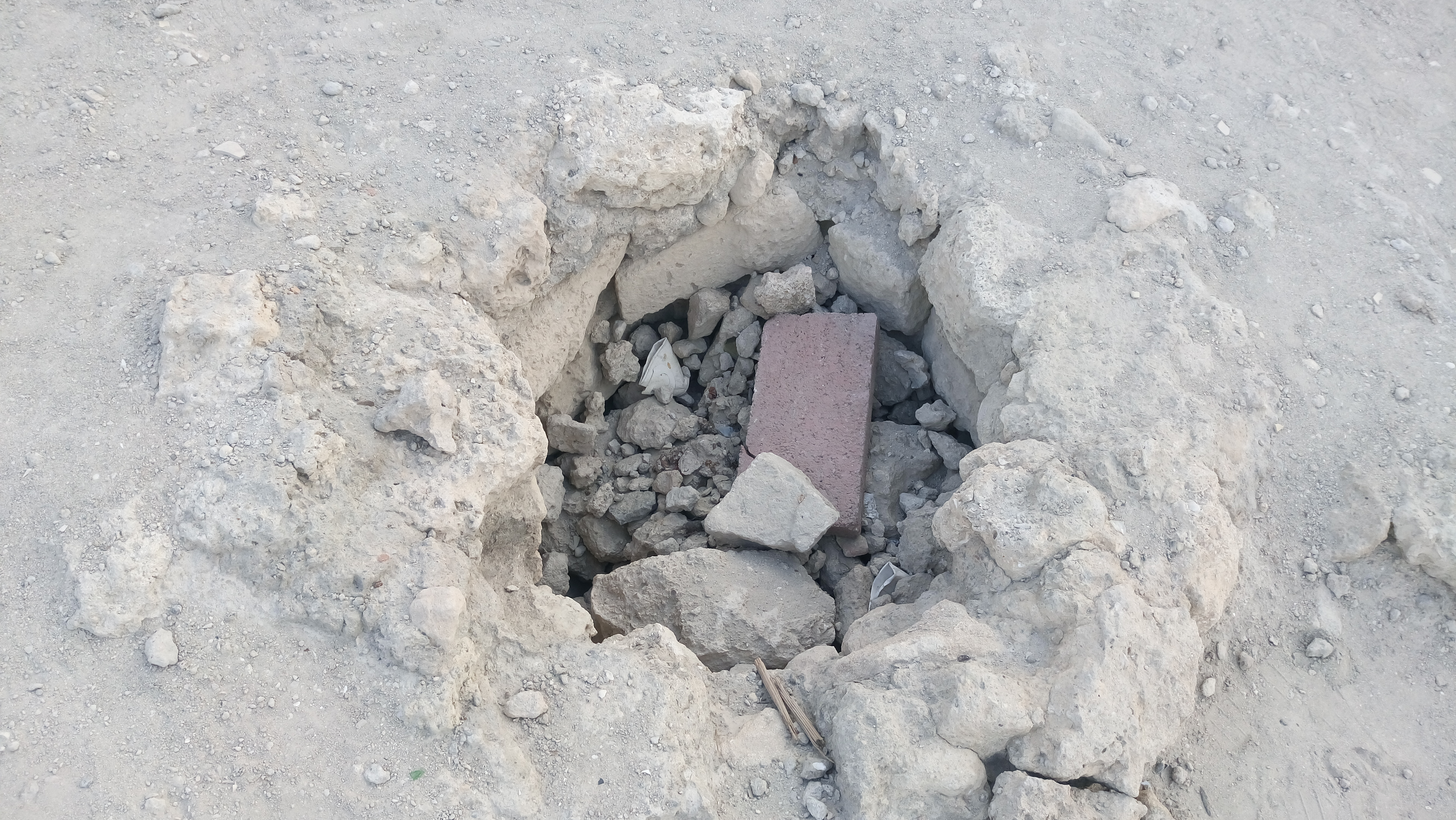 بئر تقع في منتصف قلعة تاروت من الداخل، ويُعتقد أنه كان يخزن فيها المؤونة للجنود أو كانت تفرّع لعين العودة، دُفنت البئر وقل الاهتمام بها إلى أن أصبحت على هذه الحال.